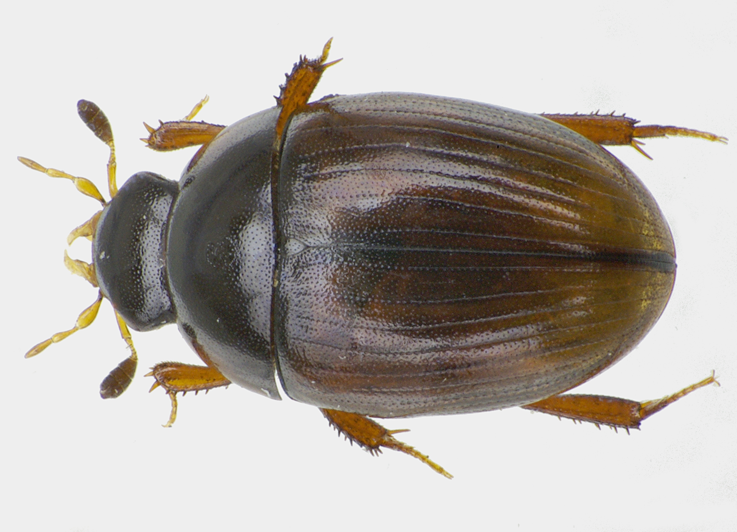 Cercyon lateralis, Aufsicht